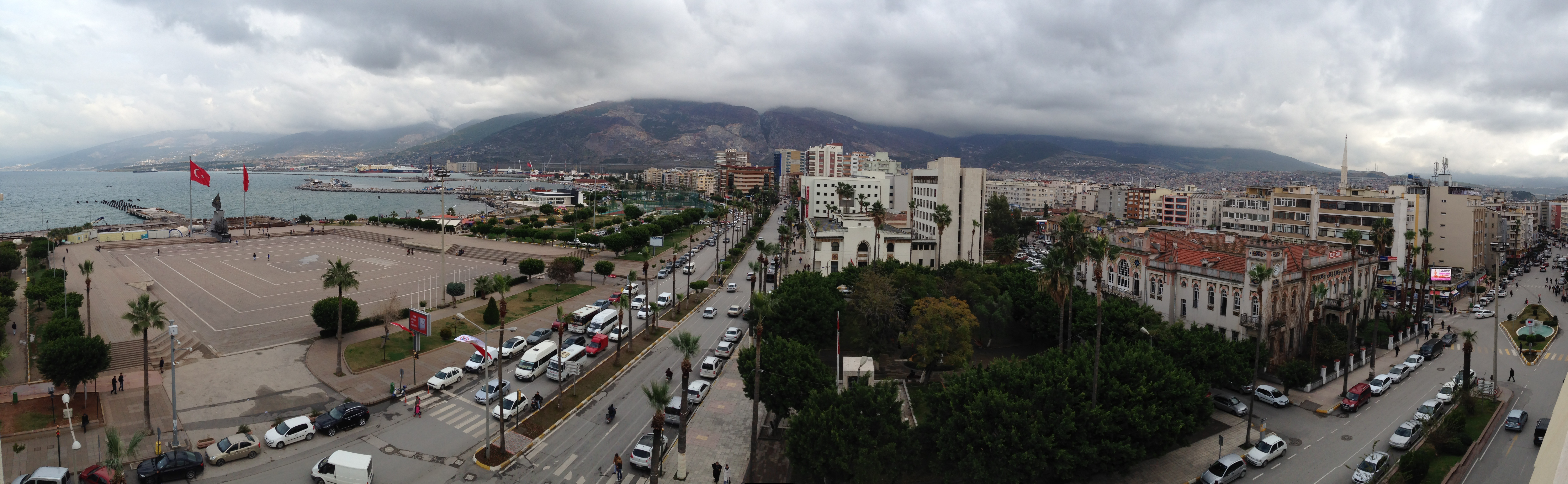 İskenderun Sahil